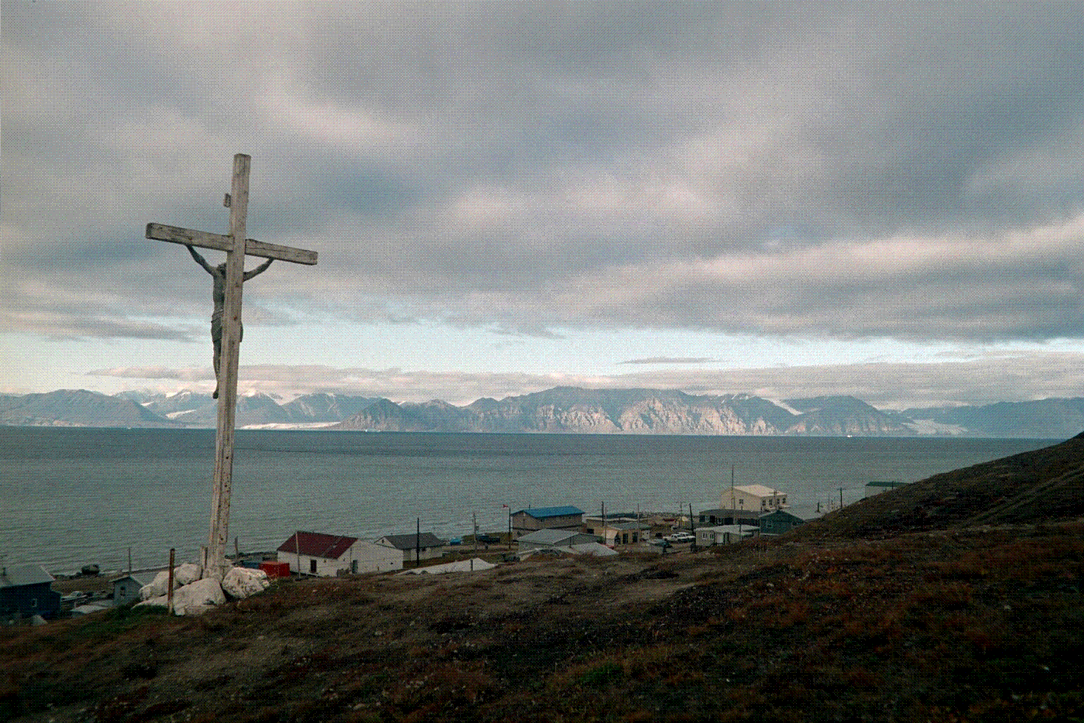 Kruzifix Pond Inlet